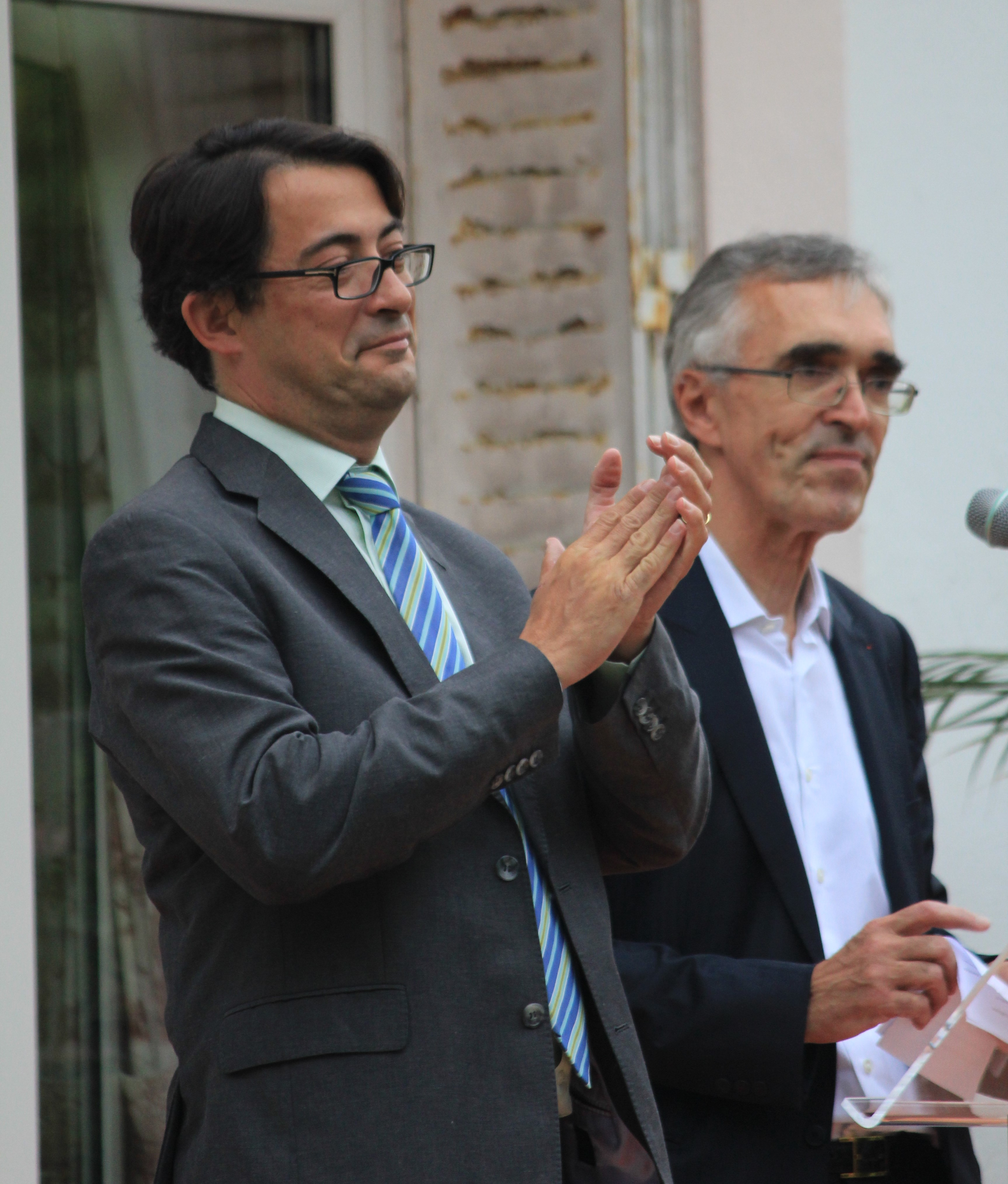 préfet du MorbihanThomas Degos (gauche) et sous-préfet du Morbihan Jean-Francis Treffel (droite) lors du festival interceltique de Lorient 2015